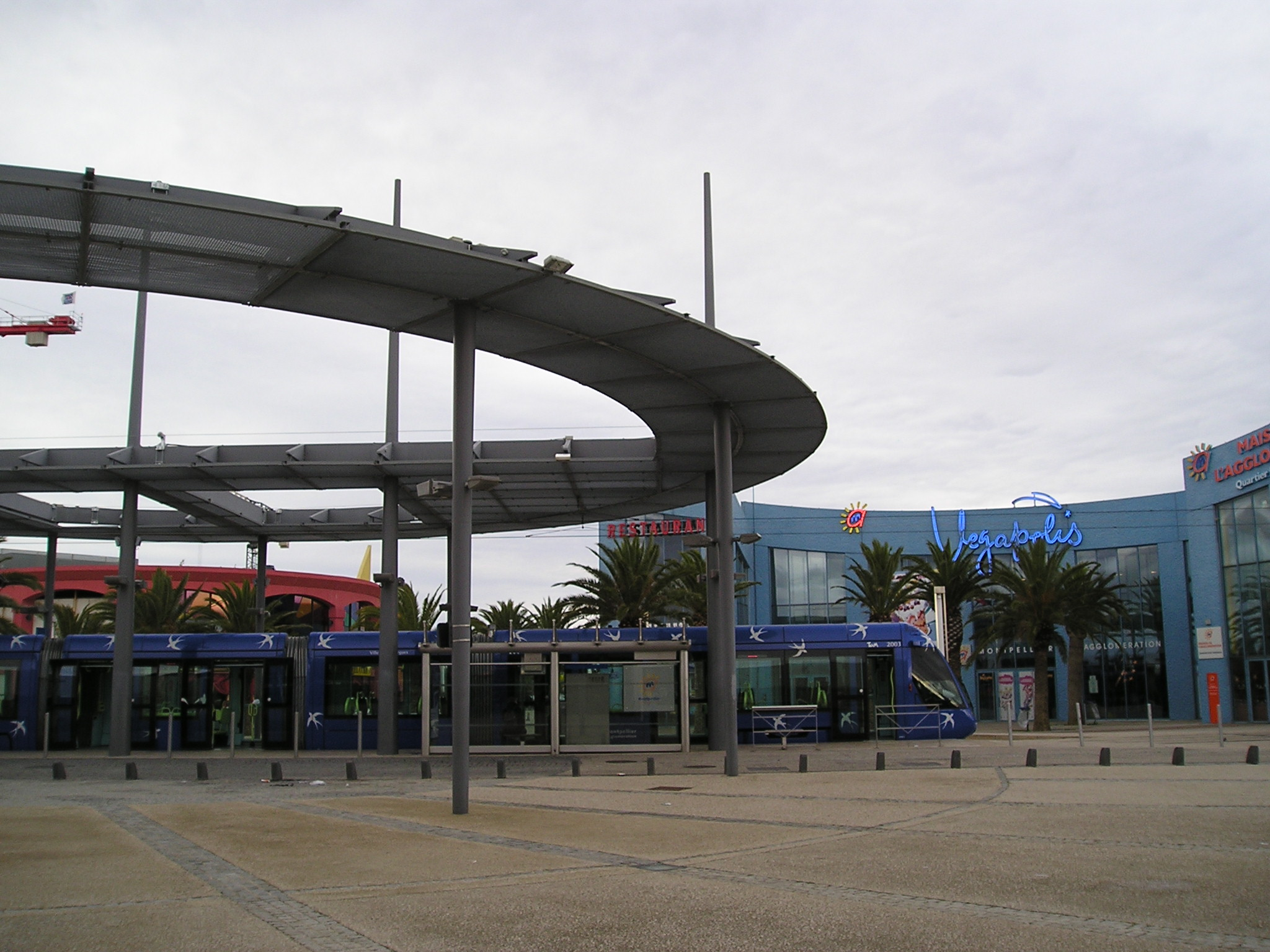 Rame au départ à la station Odysseum de la ligne 1 du tramway de Montpellier. A droite, la patinoire Végapolis.